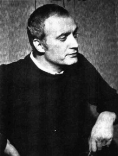 Italian actor Nando Gazzolo